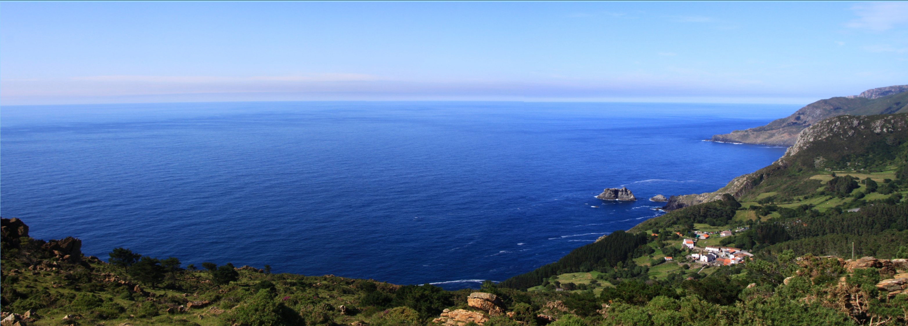 Santo André de Teixido, Régoa, Cedeira, Galicia (Spain) San Adrés de teixido esta situado en la sierra de "A Capelada" y a 12 km de Cedeira conocida población costera por sus mariscos especialmente por el percebe, cuya fiesta se celebra en el mes de Agosto